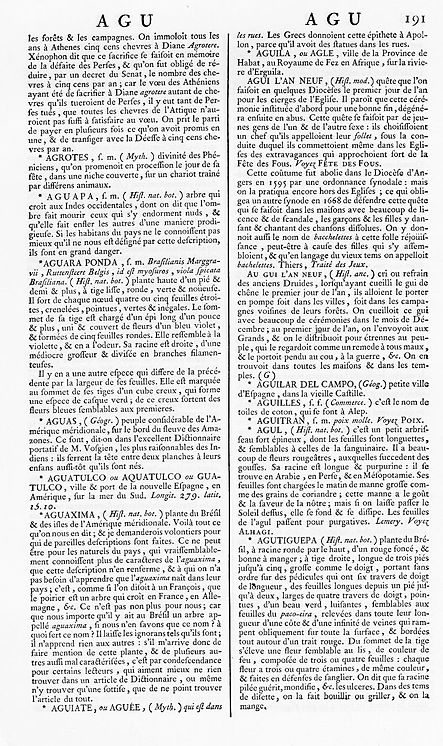 Seite 1:191 aus Diderots Encyclopédie